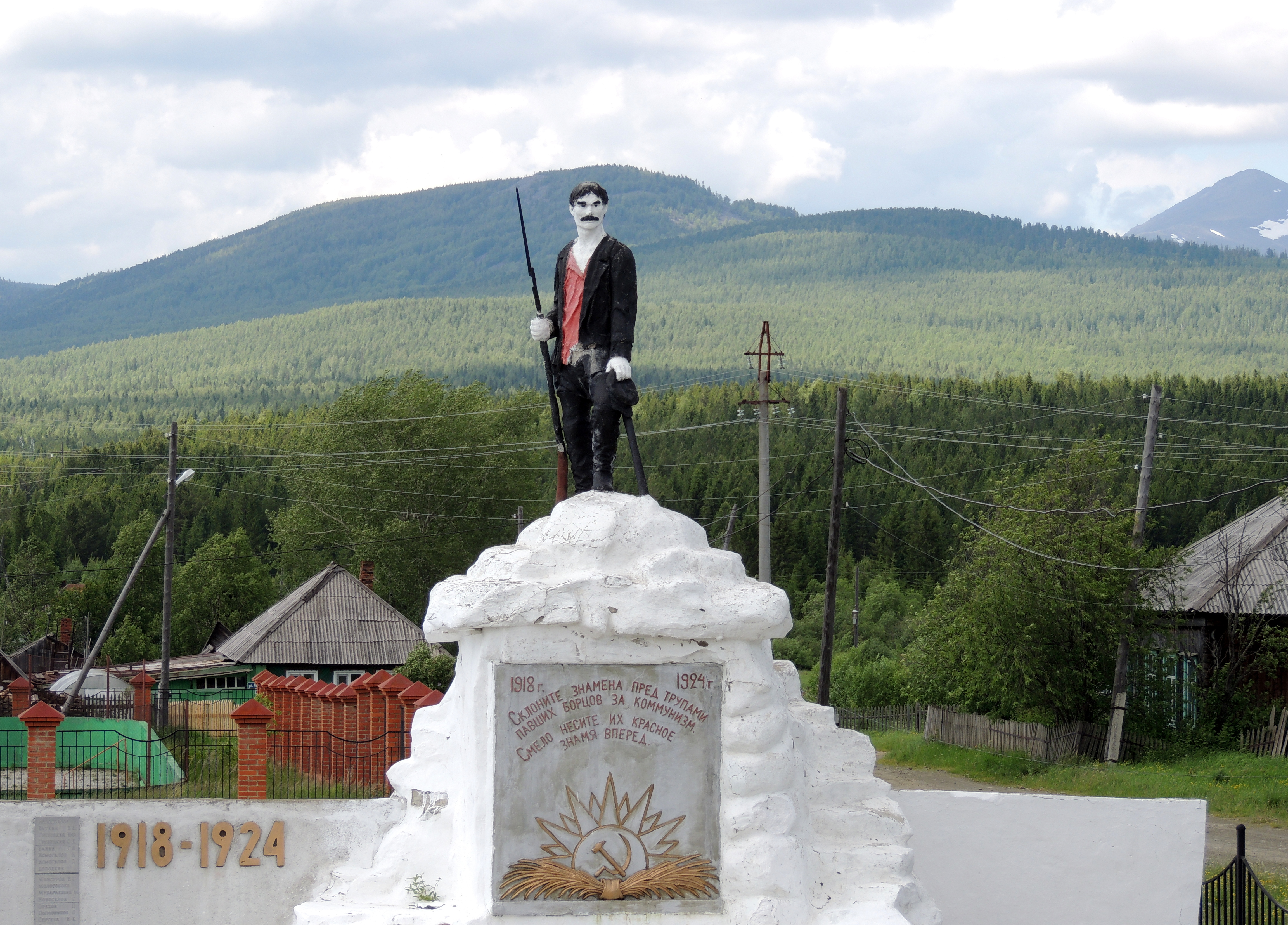 Памятник погибшим в гражданской войне в Кытлыме